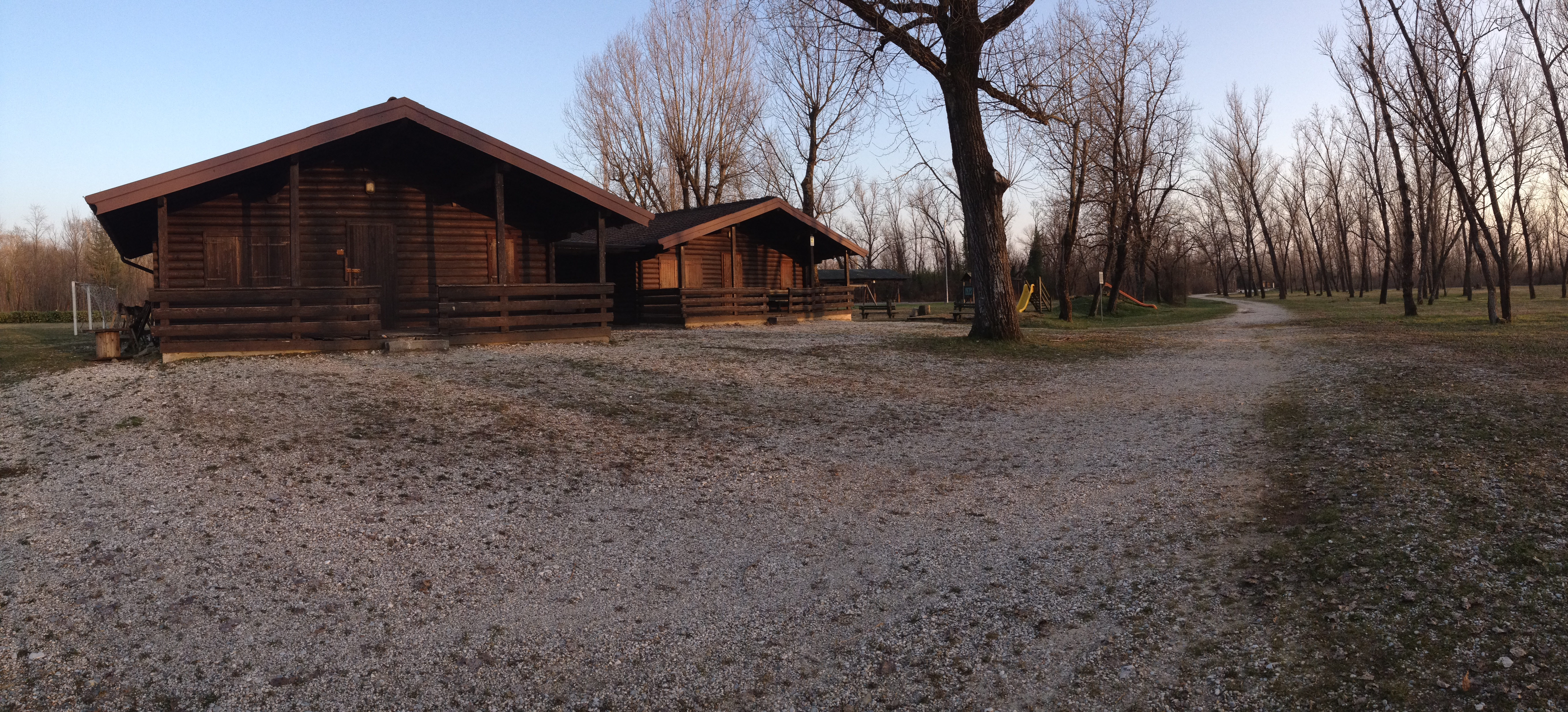 Foto di F. Curridor. Centro Vacanze di San Odorico al Tagliamento (Flaibano).